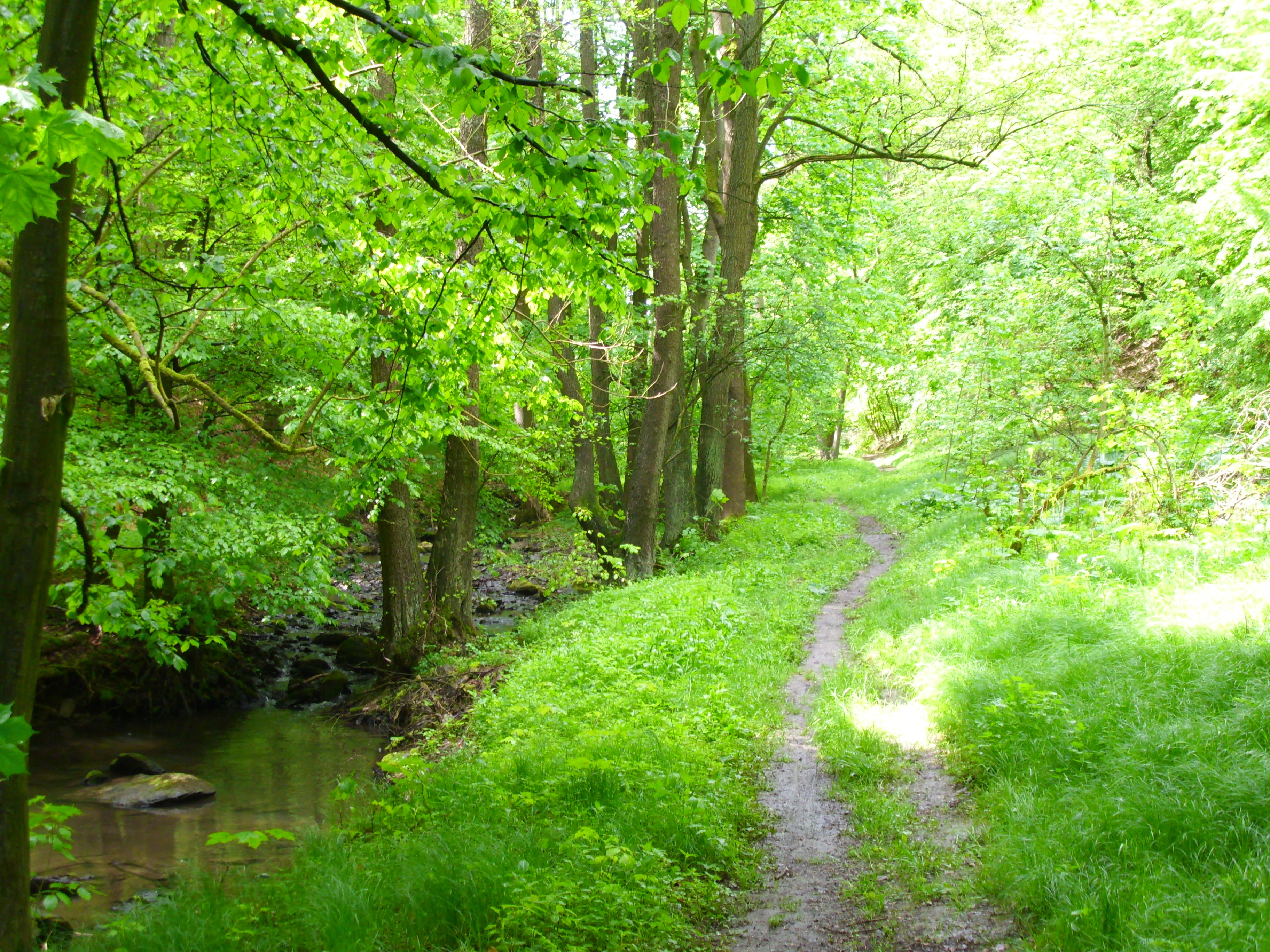 Der Lübauer Grund beginnend in Lübau mündet in den Spechtritzgrund